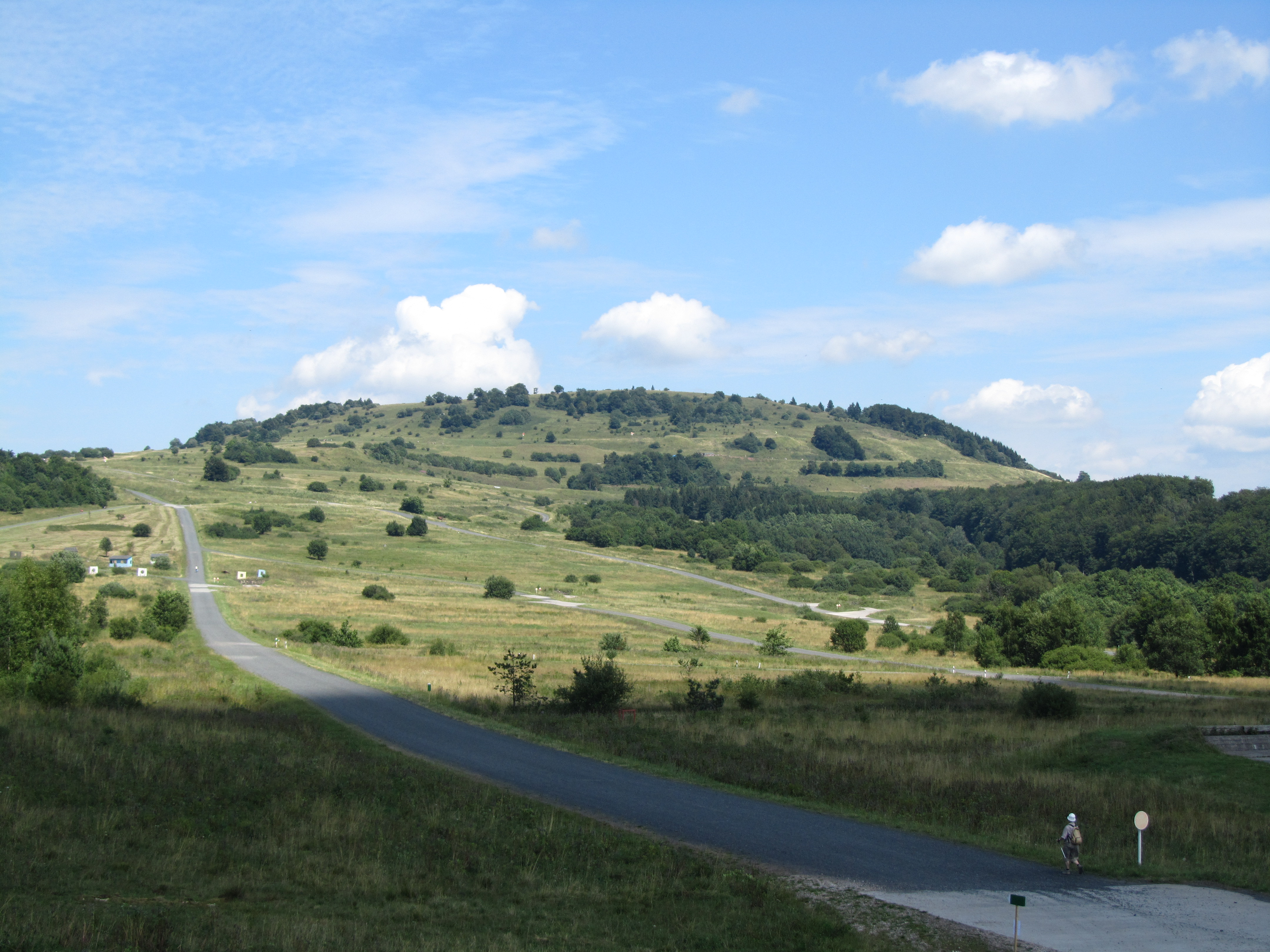 Der Kleine Auersberg (808 m) in der Rhön von Südsüdwest.